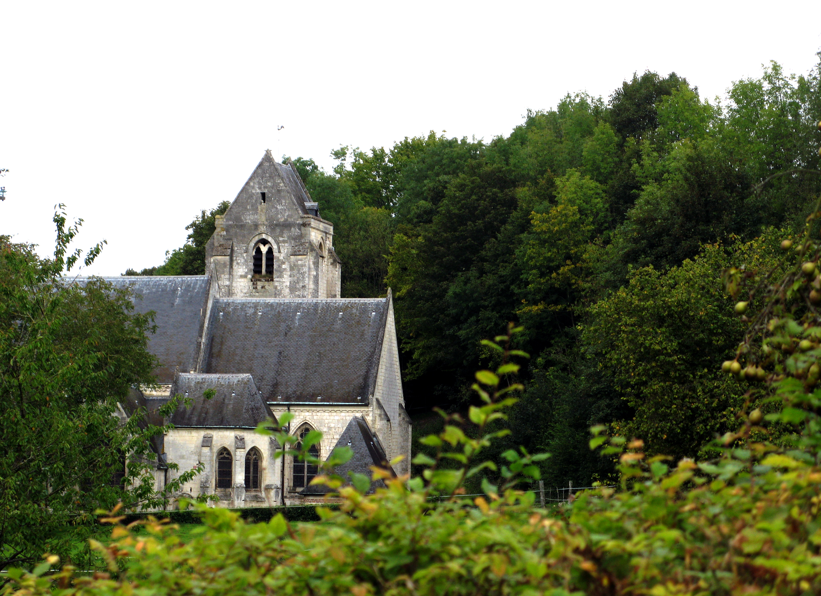 Fieffes-Montrelet (Somme, France) - L'église de Fieffes (partie du côté sud), vue depuis le chemin courant en contrebas de la forêt.